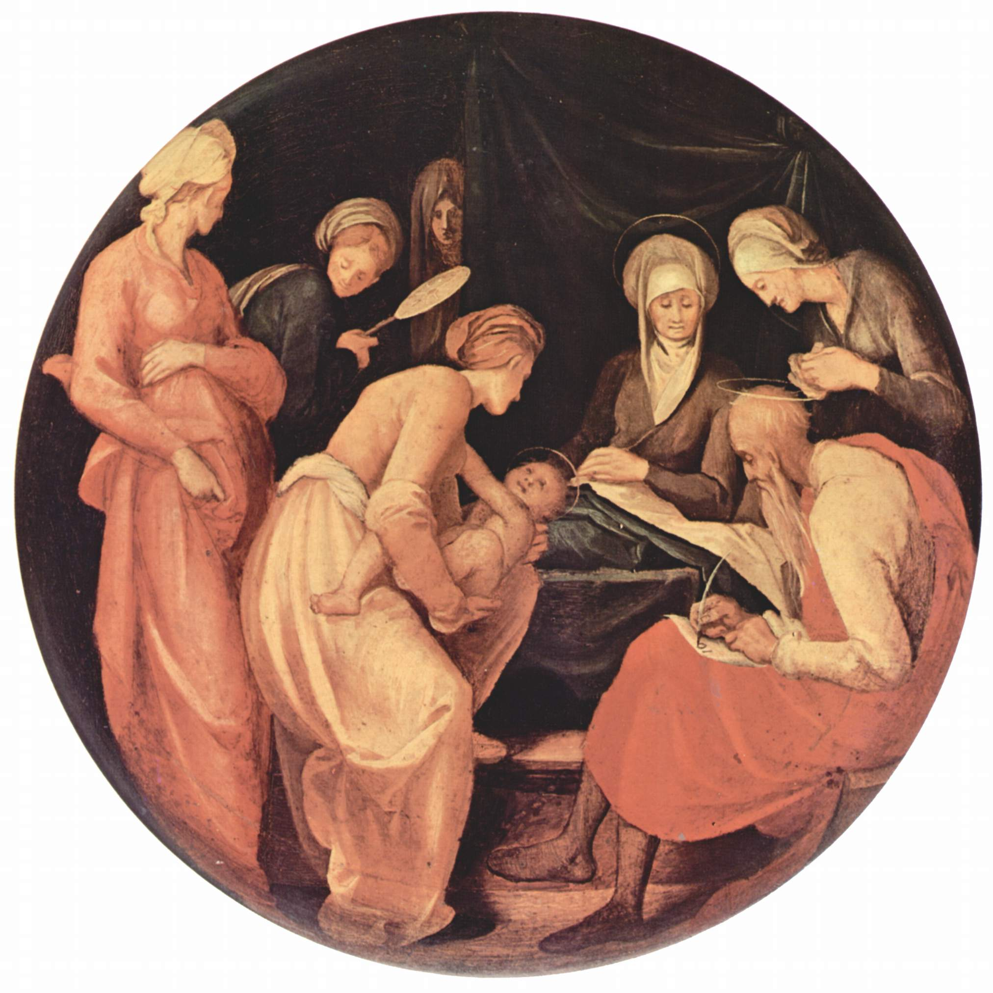 Tondo